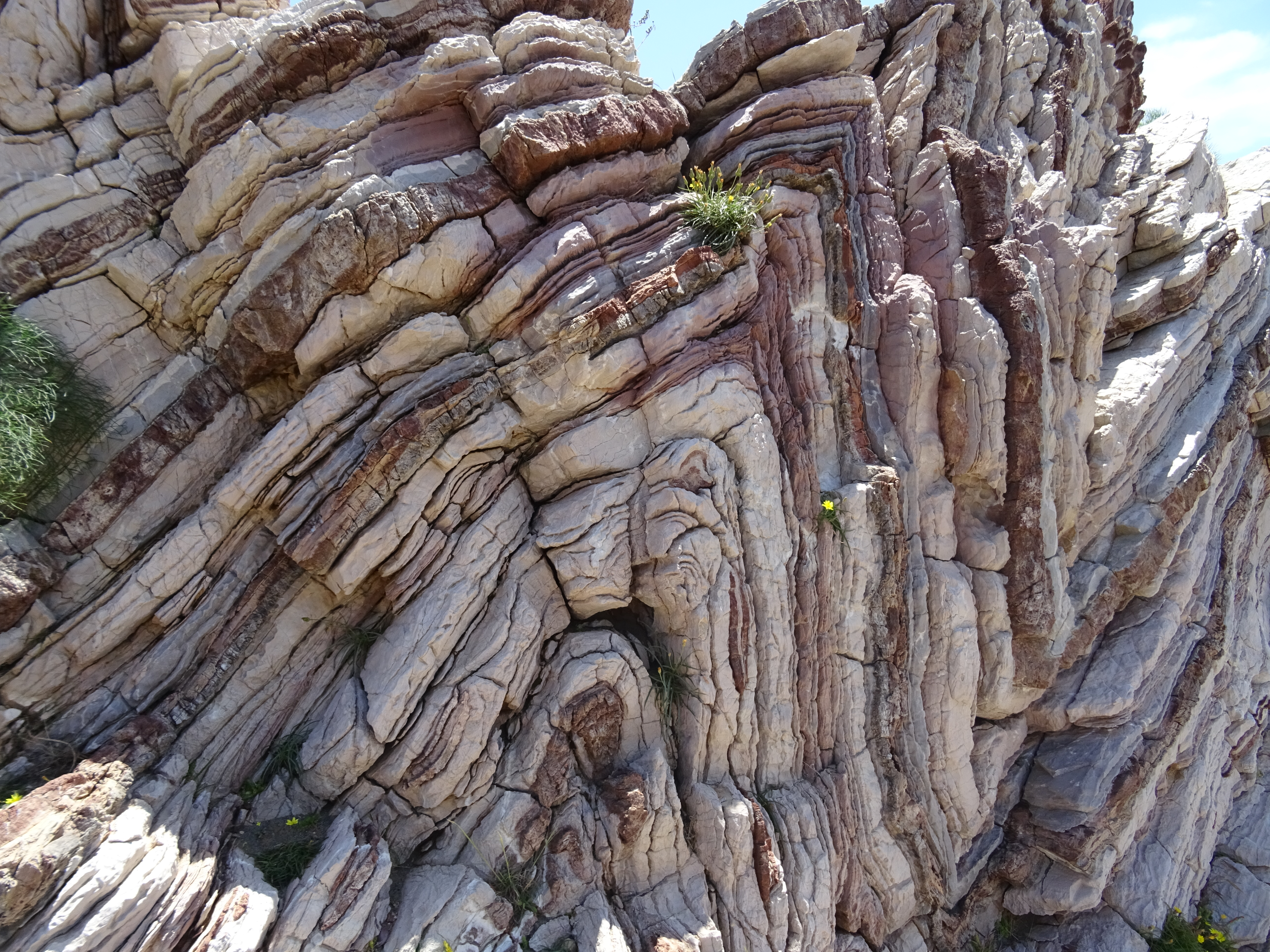 Souezhus eo ar vein-mañ pa n'eus ket anezhe e Breizh.